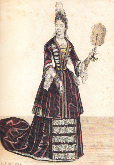 Беларуская (тарашкевіца): Тэрэза Гасеўская (з Сапегаў)